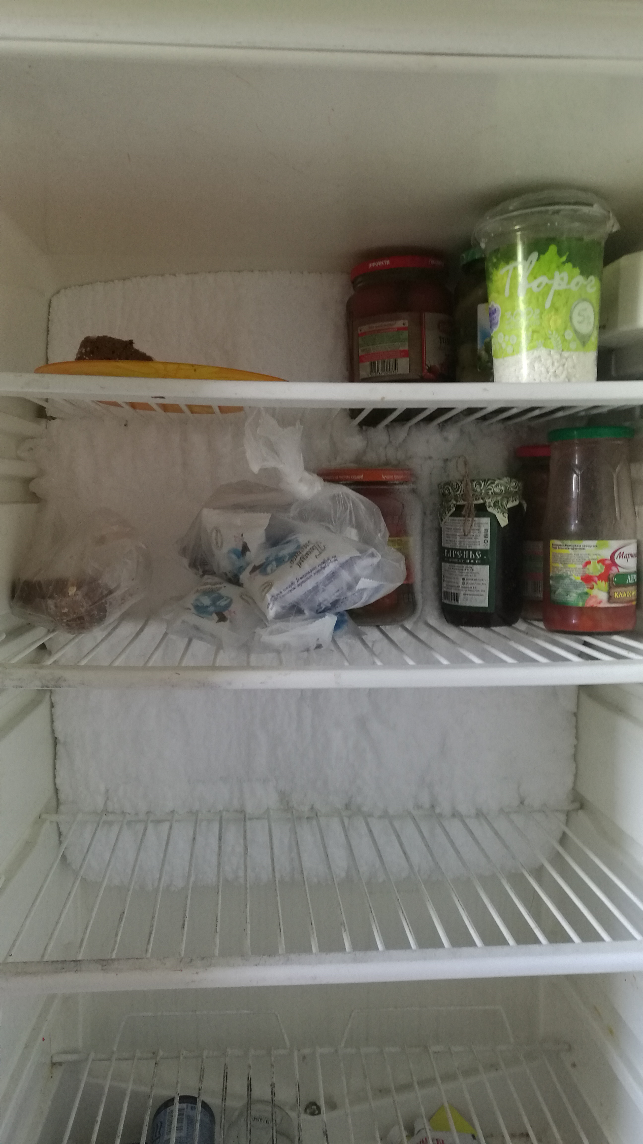 Ftostiĝinta fridujo. Tjumeno, Rusio.